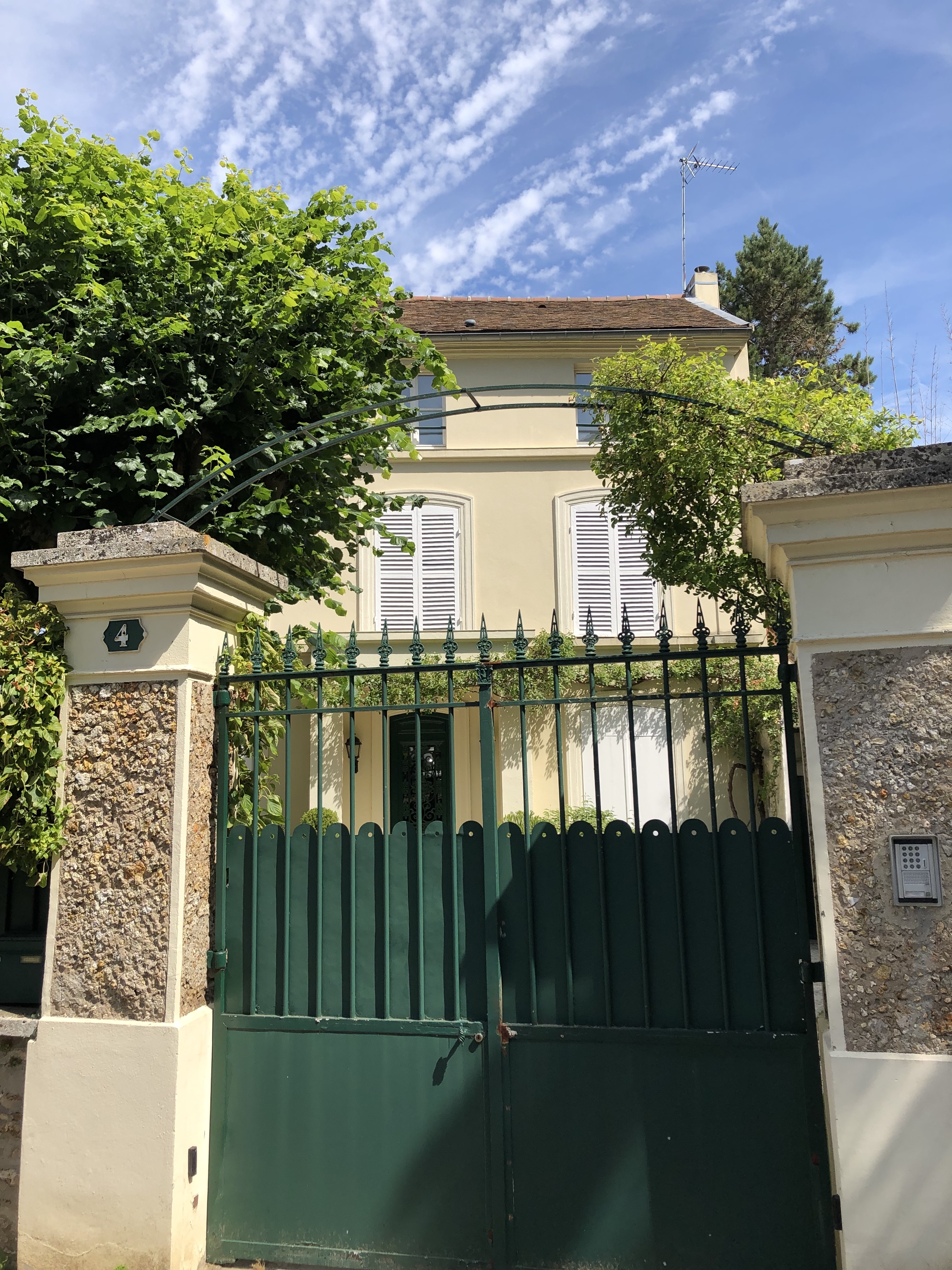 Maison Auguste Renoir à Montbuisson (Louveciennes)